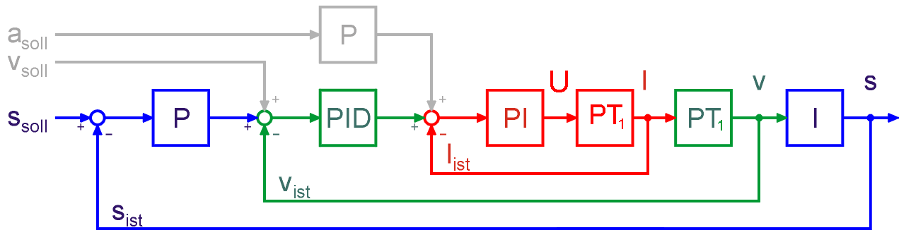 Blockdiagramm eines Kaskadenregelkreises (Lageregelung mit einem Elektromotor)